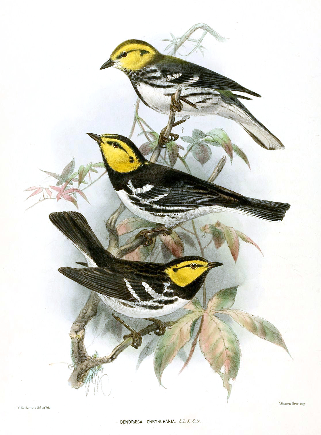 Dendroica chrysoparia